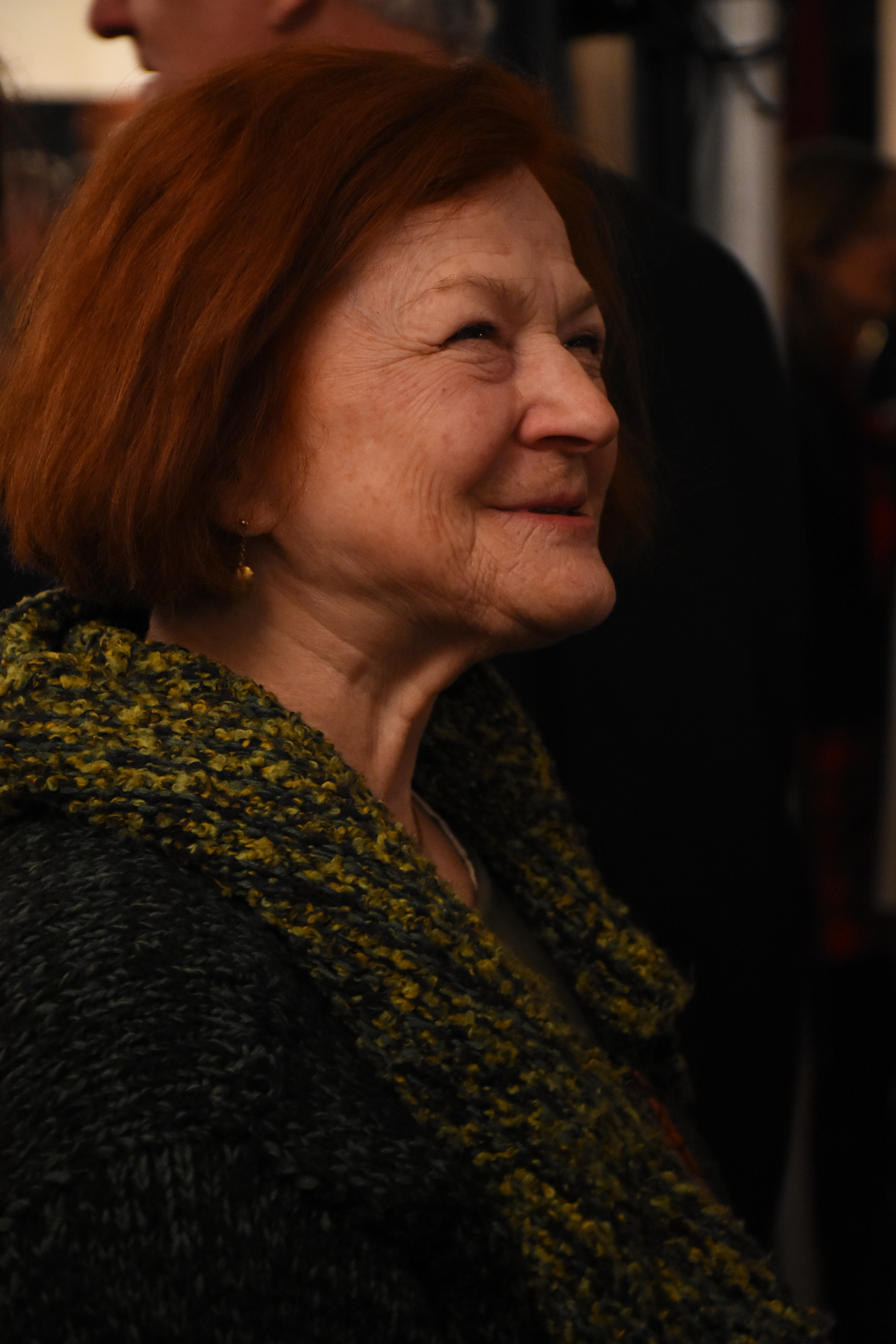 Setkání signatářů k 40. výročí Charty 77, Palác Lucerna, Praha, 7. ledna 2017Helena Klímová